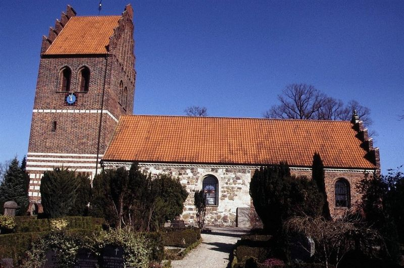 Gladsaxe Kirke i Danmark. Gladsaxe kirke